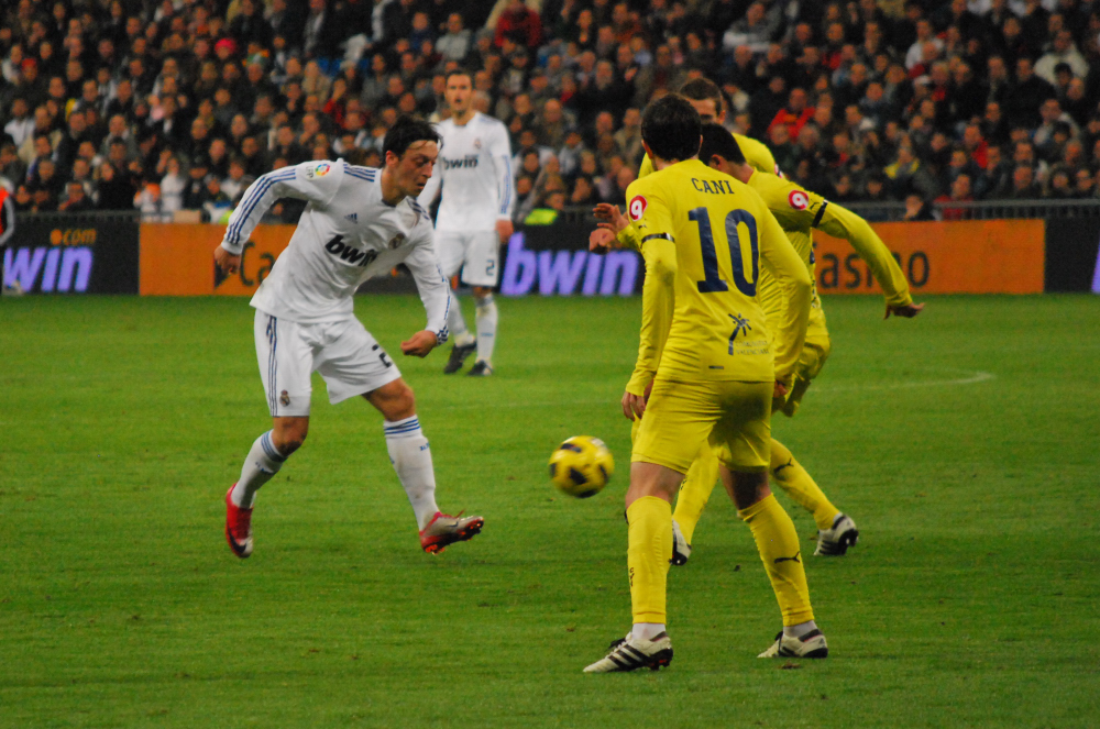 Real Madrid 4 - Villarreal 2 La Liga: 9 de Enero 2011